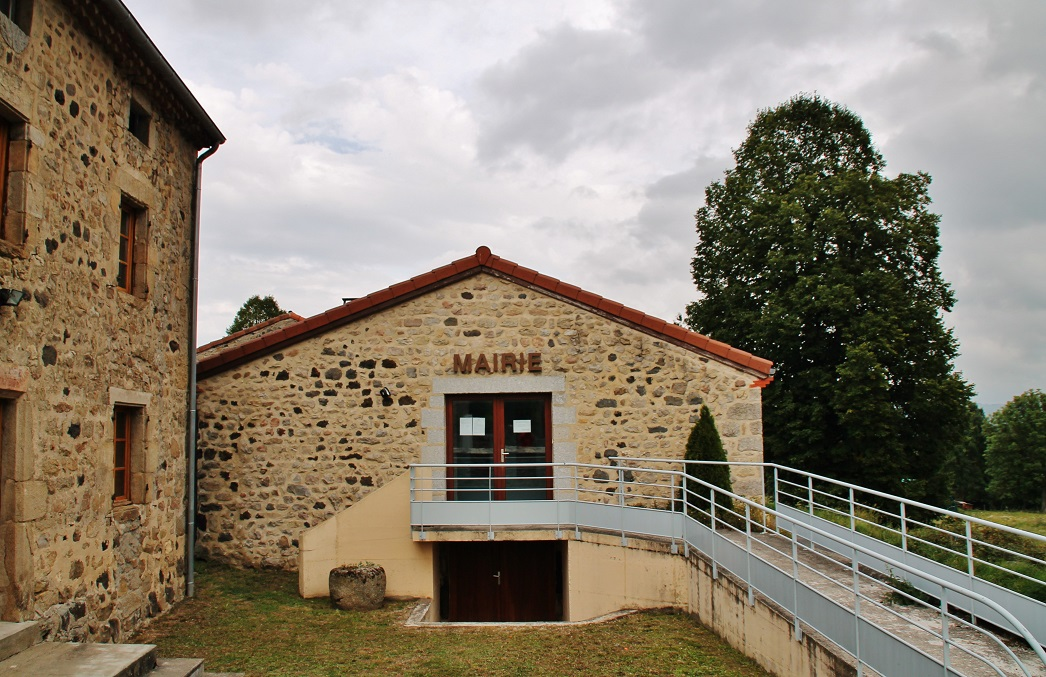 La Mairie